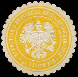 Sealing stamp Title: Direktion der Provinzial-Heil- und Pflegeanstalt Plagwitz Description: gelb, weiß, geprägt Place: Plagwitz size: 3 cm